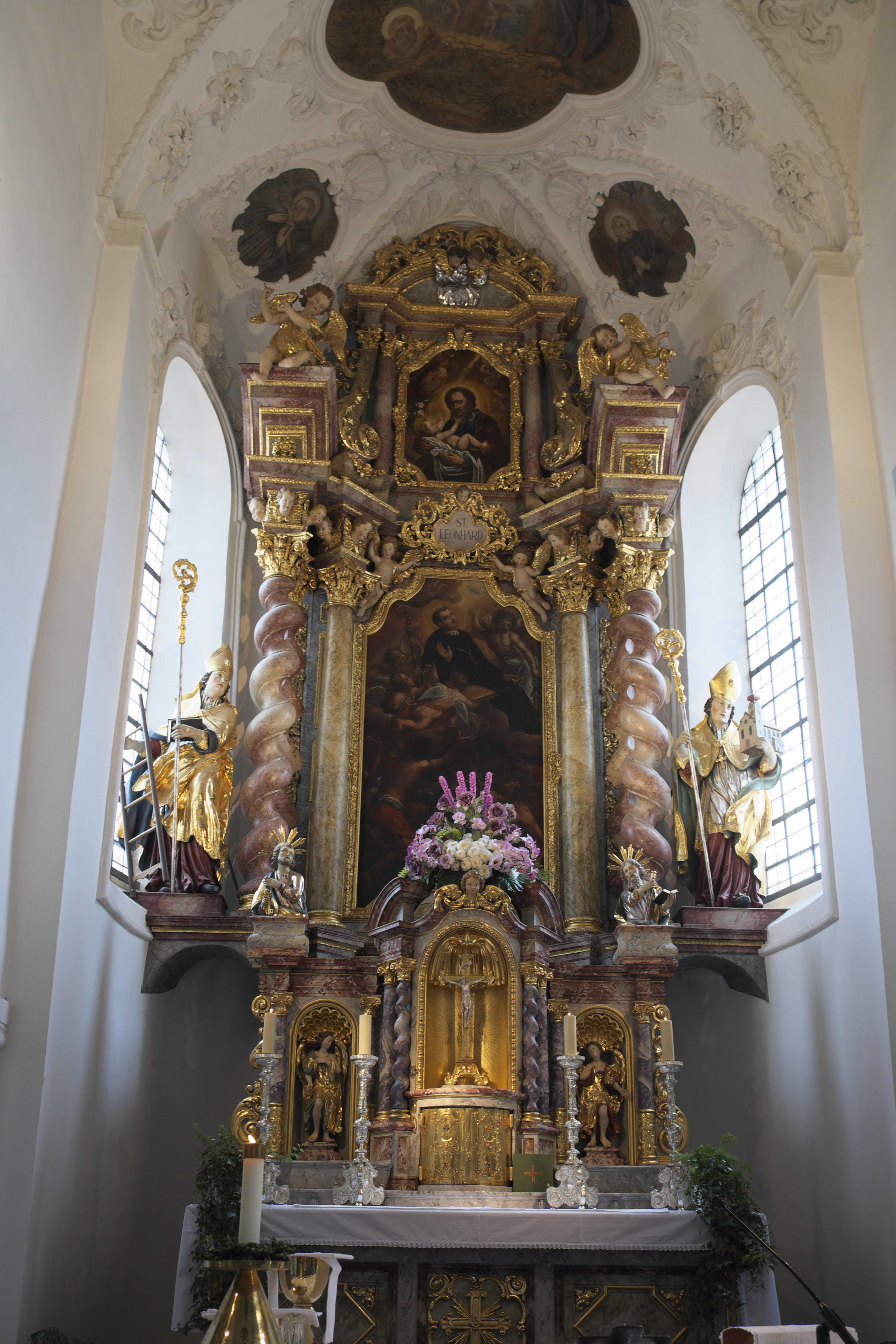 Katholische Pfarrkirche St. Leonhard in Pförring im oberbayerischen Landkreis Eichstätt (Bayern/Deutschland), Hochaltar von 1724